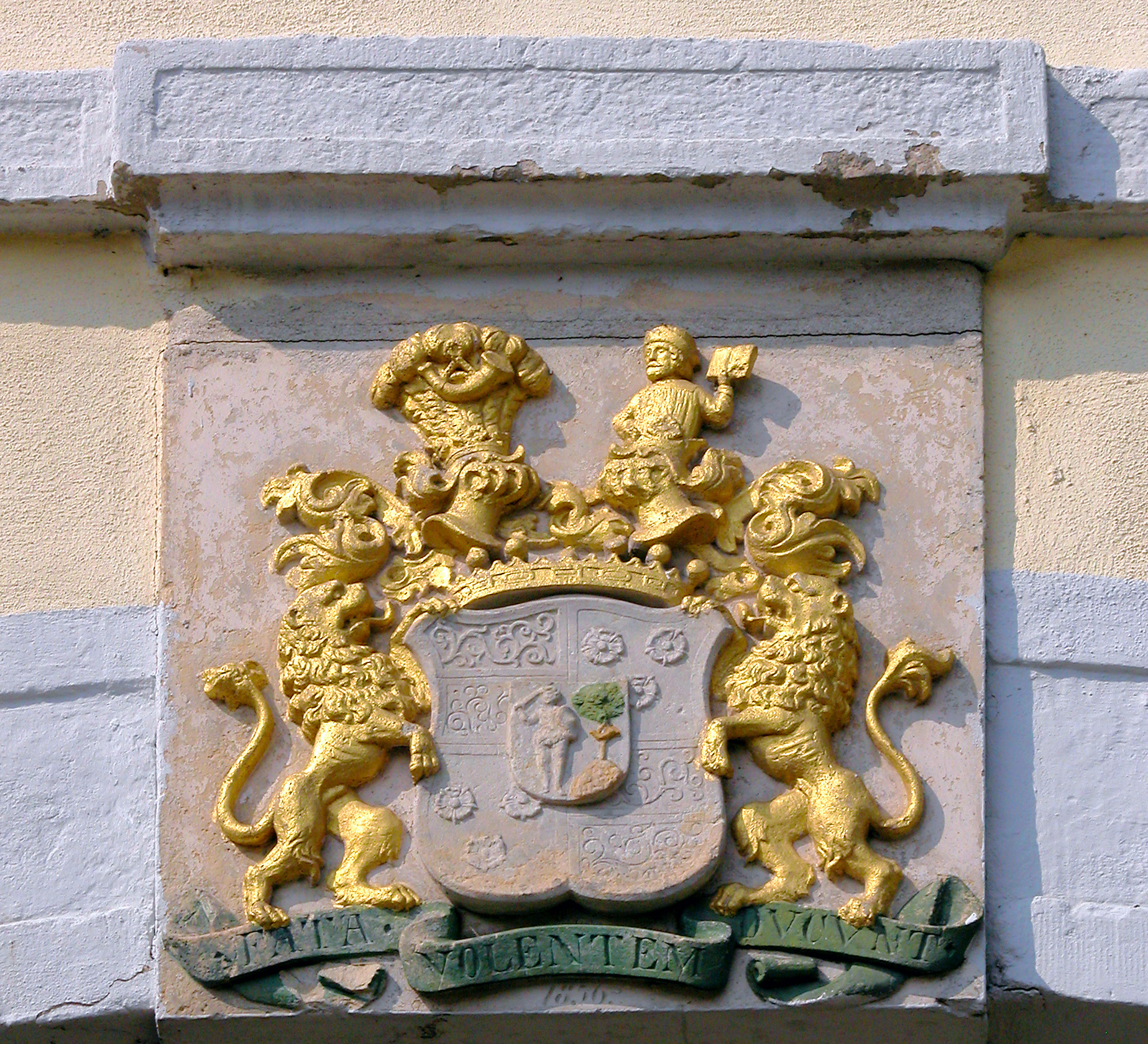 30.03.2007 01683 Wendischbora (zu Nossen): Das Torhaus von 1856 teilte das Rittergut Wendischbora in Nieder- und Oberhof. Erbauen ließ es C. H. von Wöhrmann. Die Ansicht von Osten (Bild) zeigt über der Tordurchfahrt das Wappen des Freiherrn Christian Heinrich von Wöhrmann auf der Westseite sieht man Monogramm H.v.W. und die Jahreszahl 1856. Rechts hinten befindet sich das Schloß. [DSCN21712.TIF]20070330205DR.JPG(c)Blobelt